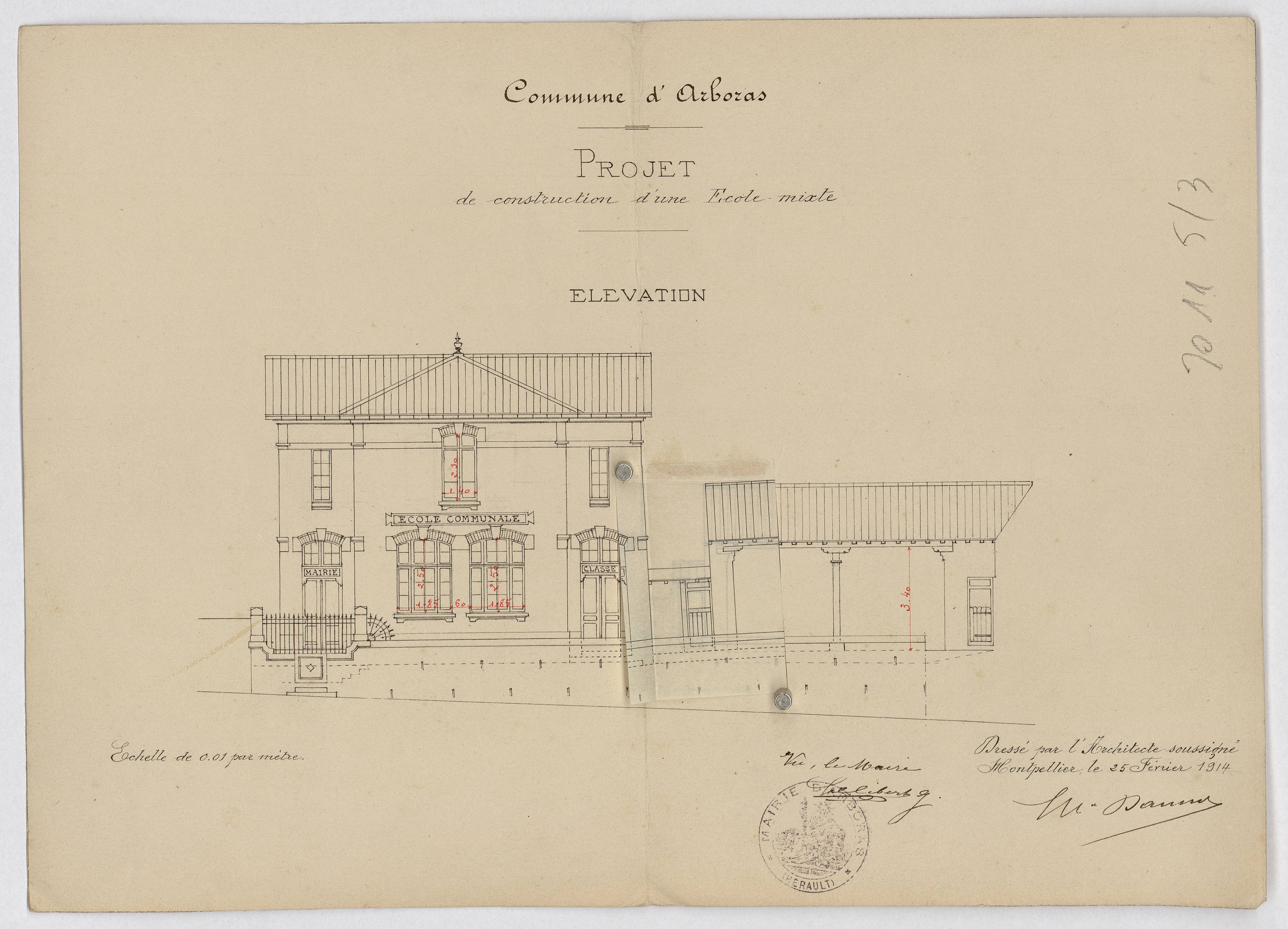 Arboras. - Élévation d'une école : plan du projet